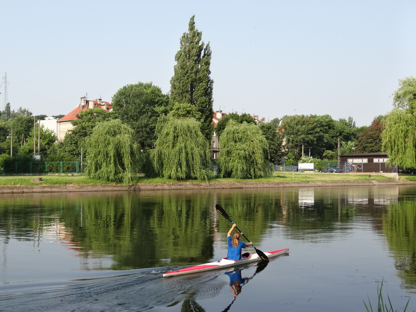 Kajakarstwo na Brdzie (Bydgoski Klub Wioślarek)